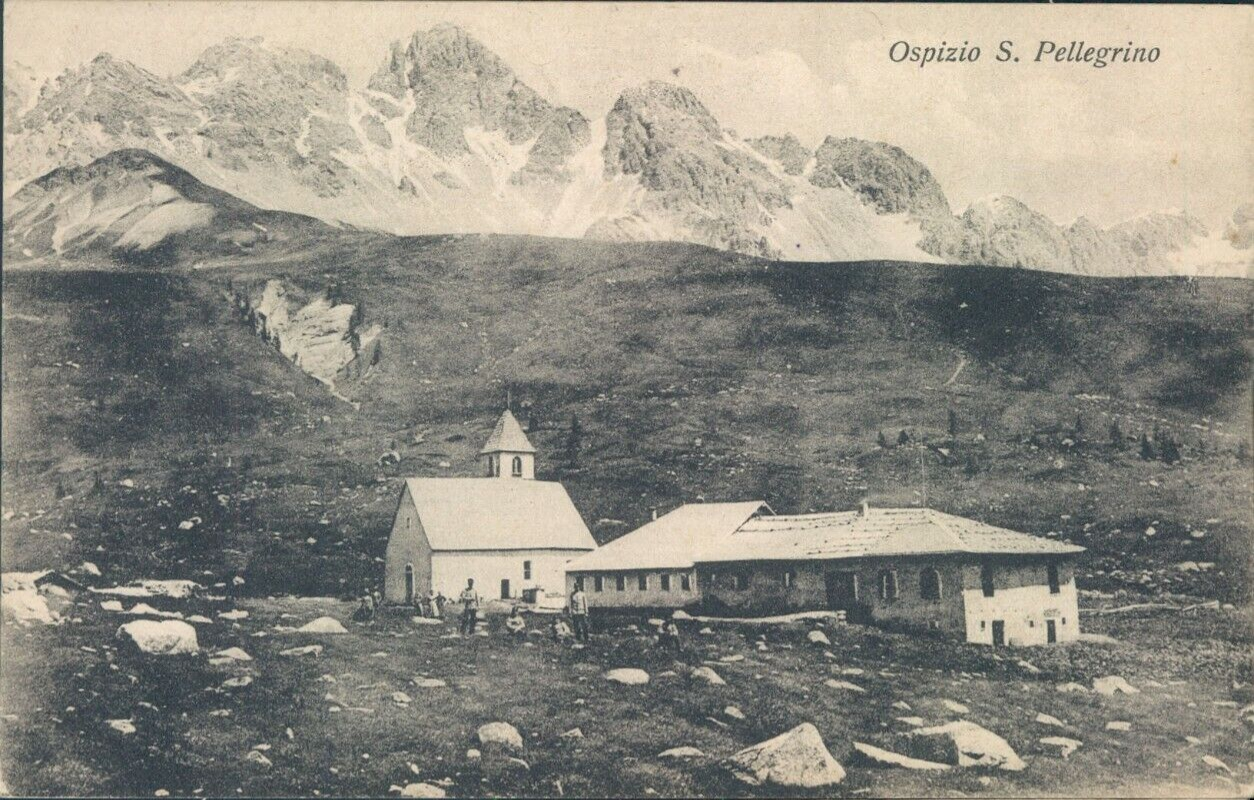 Antico ospizio del passo San Pellegrino (Moena) prima della distruzione avvenuta nel 1915 durante la prima guerra mondiale